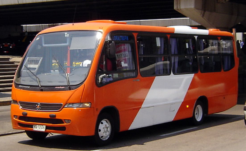 Bus Lokal Trafik prestando servicio a RedBus.